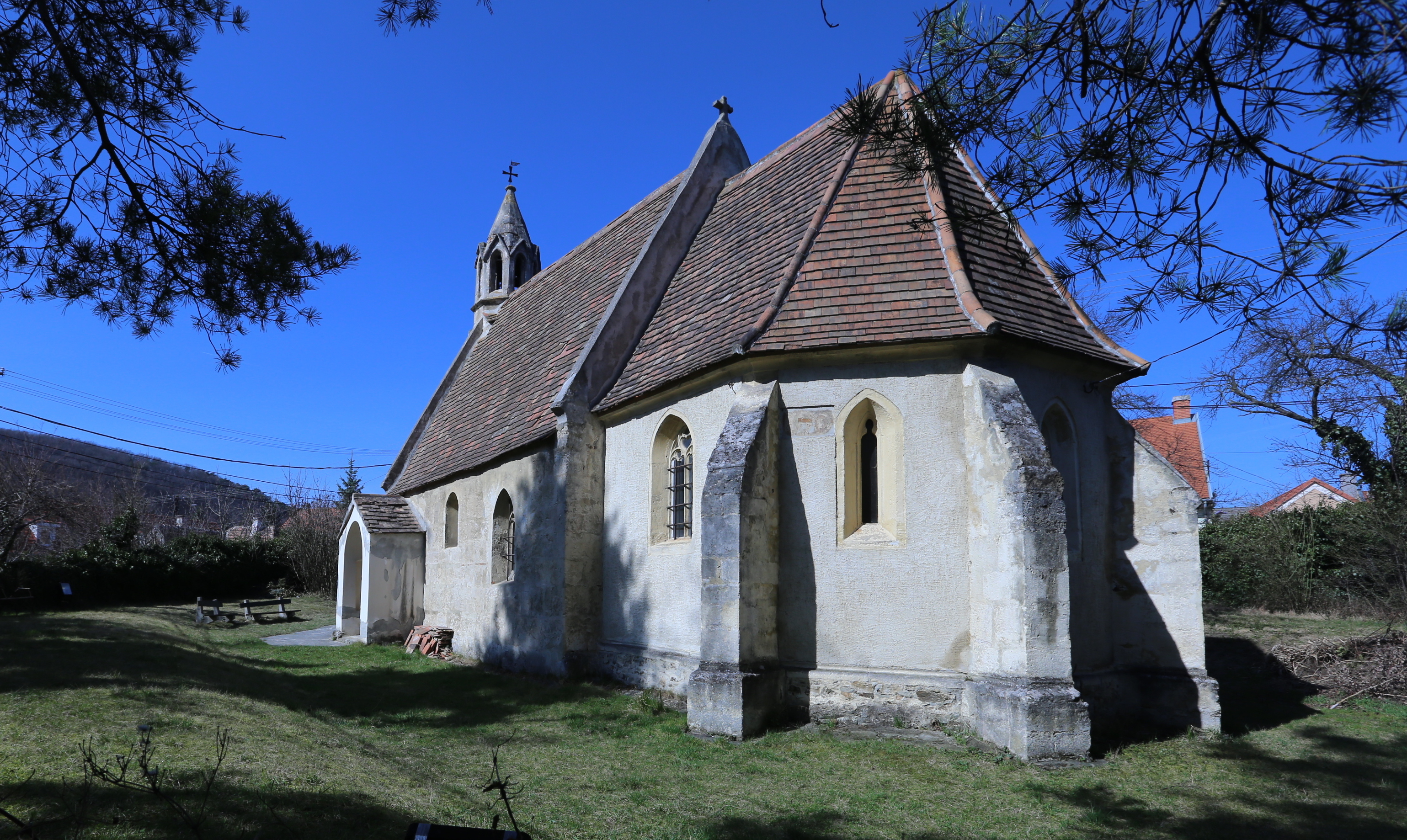 Bánfalva, Mária Magdolna templom